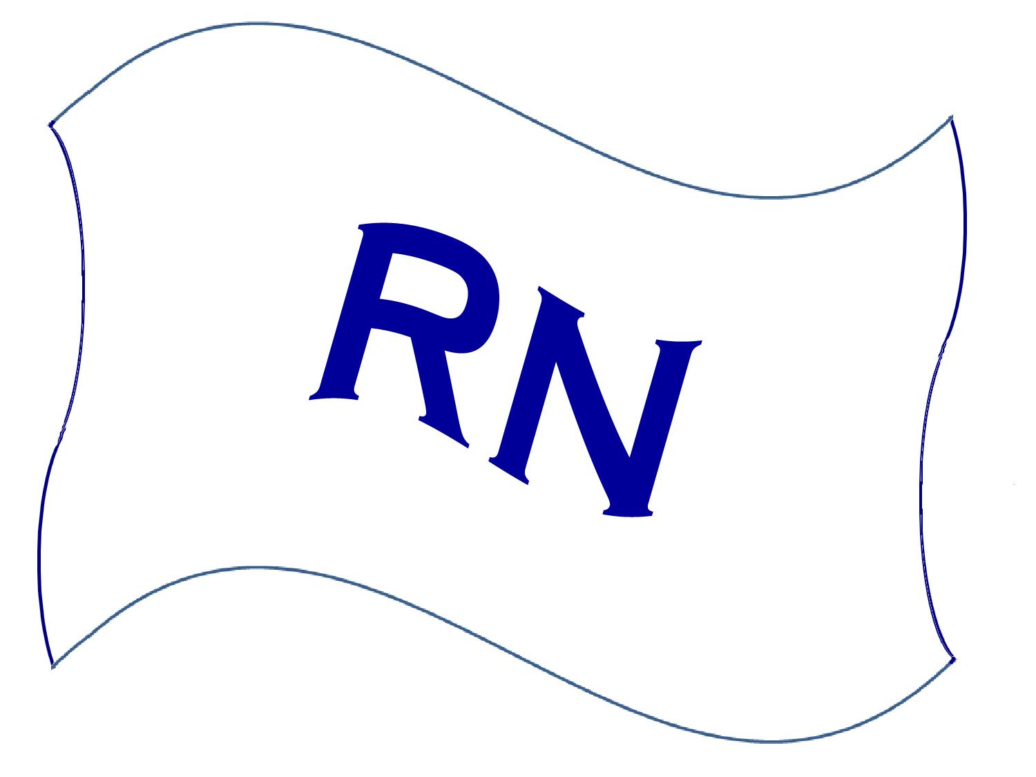 Bandera Resistencia Nicaragüense.